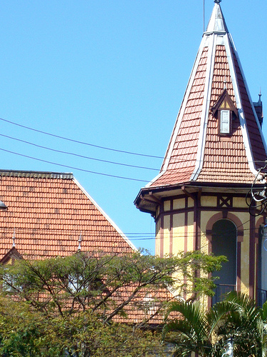 Foto do Palacete Baruel no Alto de Santana, cidade de São Paulo.